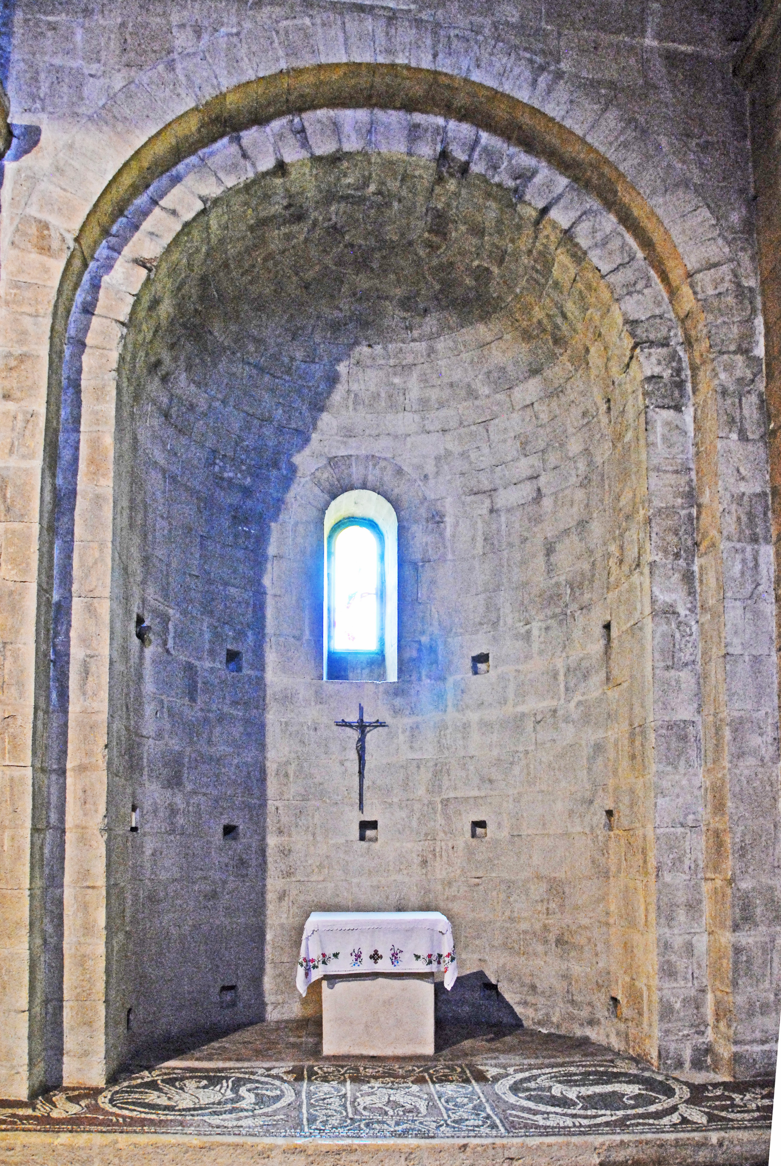 Prieuré de Ganagobie, Südapsis